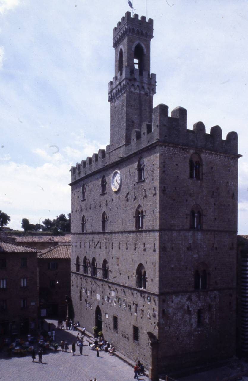 Servizio fotografico : Volterra, 1978 / Paolo Monti. - Foglio: 1, Fotogrammi complessivi: 1/20 : Diapositiva, sviluppo cromogeno/ pellicola ; 35 mm. - ((Sullo chassis della diapositiva n. 01 iscrizione manoscritta: "Volterra". - Le diapositive nn. 02-20 costituiscono un'altra serie. - Sullo chassis della diapositiva n. 1 striscia adesiva in carta bianca con iscrizione inventariale? ("MO 270"). - Occasione: Reportage a colori sulle piazze italiane. - Fonte: Rubrica di Paolo Monti: Diapositive 24x36mm (1948-1982), presso Archivio Paolo Monti. Rubrica con elenco soggetti e numeri di inventario (da 1 a 1000) corrispondenti ai fogli a tasche in pvc in cui sono contenute le diapositive. - Fonte: Fattura di Paolo Monti: IV. Commesse/ Fattura n. 11/ Reportage fotografico diapositive a colori su piazze italiane (1978/06/30), presso Archivio Paolo Monti. Fotografie eseguite sulle seguenti piazze: Verona, Vicenza, Padova, Palermo, Cefalù, Carpri, Napoli e Nardò. Materiali e sviluppi: N. 18 rulli colore 6x6, n. 17 rulli colore 35mm, n. 18 sviluppi 6x6; n. 17 sviluppi 35mm